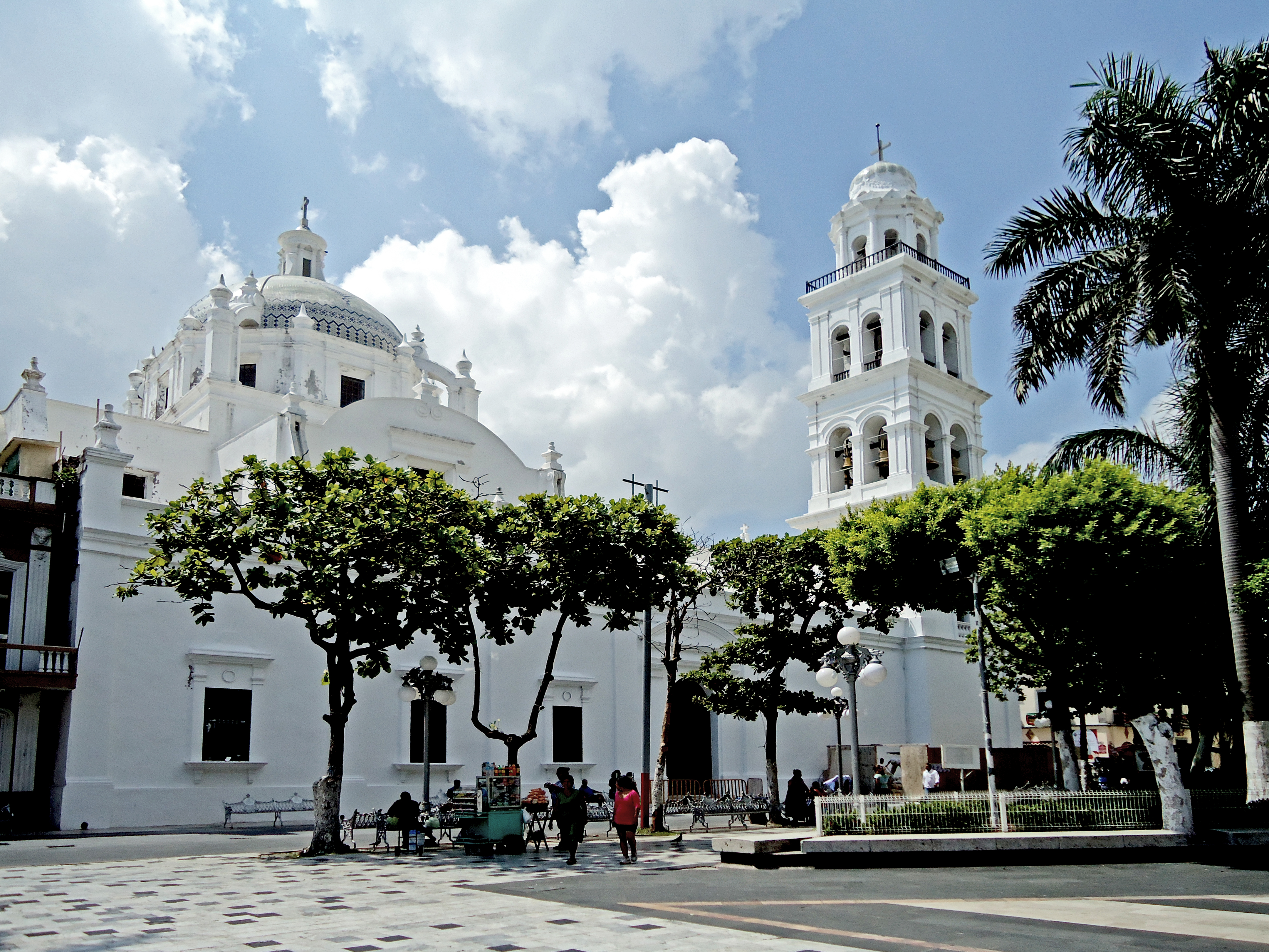 Vista desde el frente del Palacio Municipal de Veracruz, hacia la Catedral de Nuestra Señora de la Asunción. Toma realizada por Enrique Carpio Martínez.